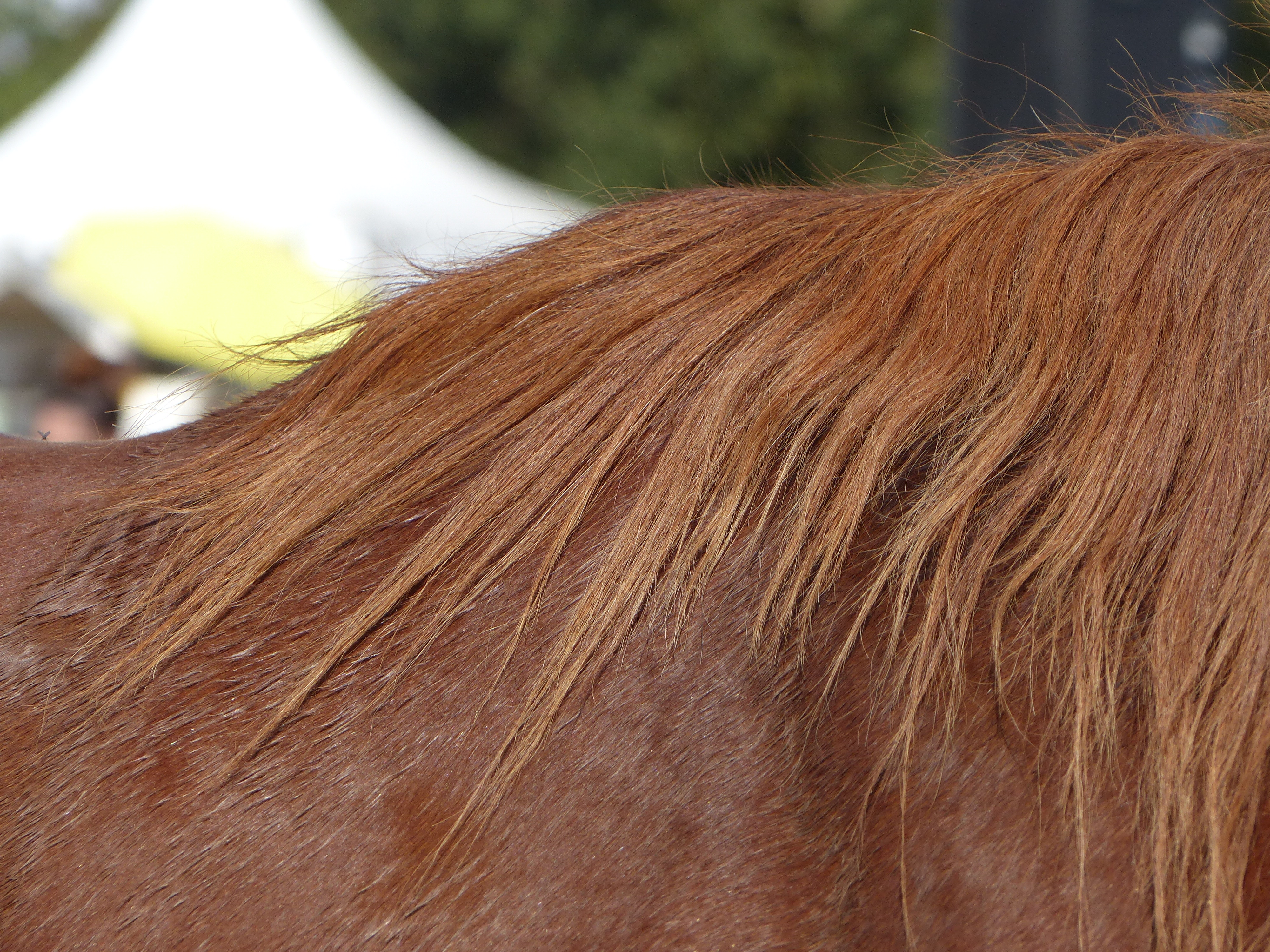 Garrot d'une jument bretonne de robe alezan, à la Fête du cheval de l'âne et du poney à Rennes, La Prevalaye, septembre 2019